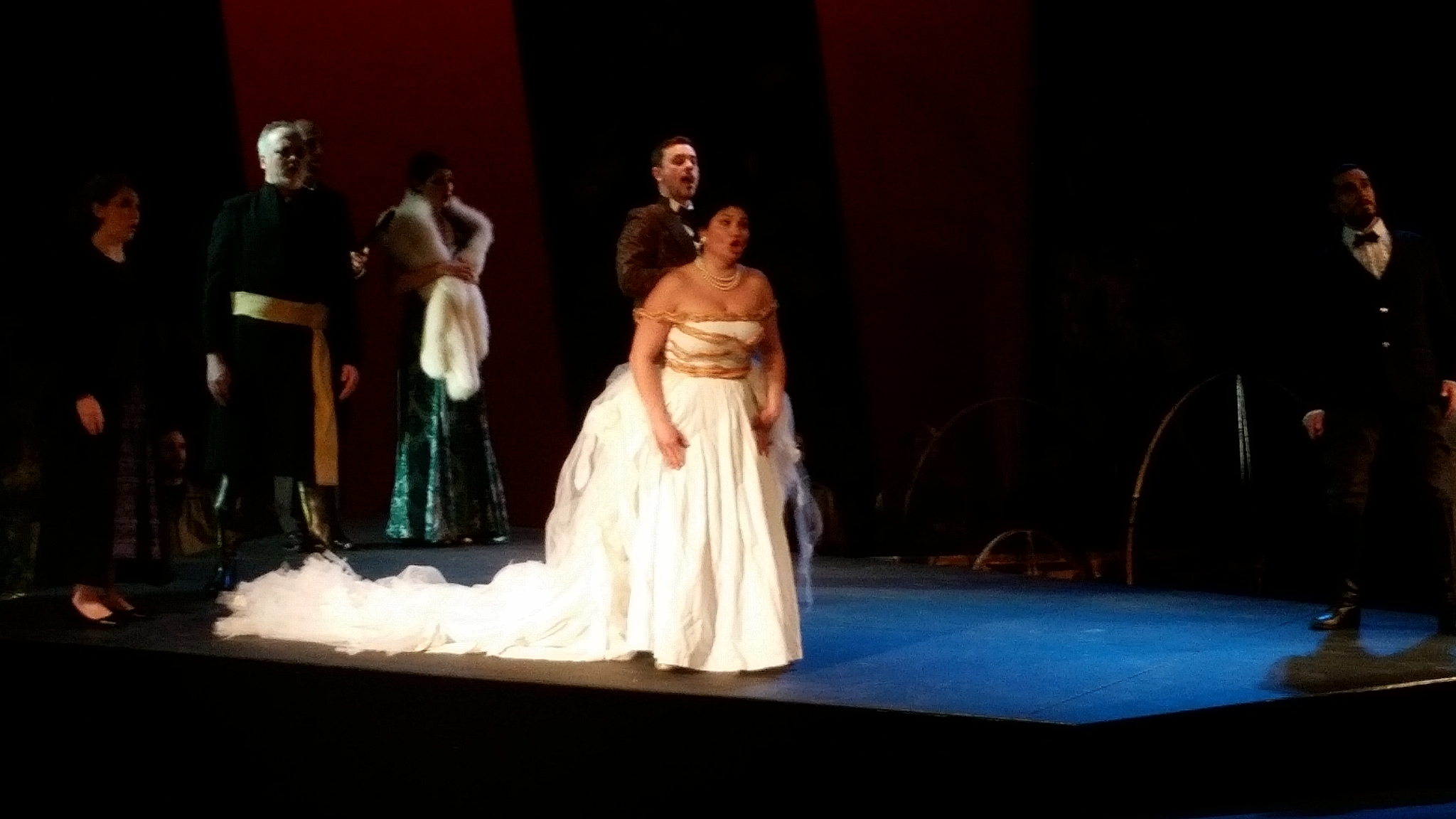 Soprano coloratur turque lors de la représentation de Lucia di Lammermoor, opéra de Gaetano Donizetti, donné à l'opéra de Massy le 12 février 2016.